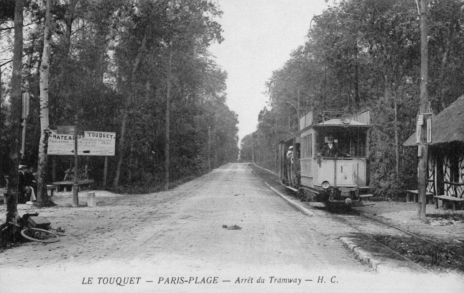 Carte postale ancienne éditée par H. C. LE TOUQUET - PARIS-PLAGE : arrêt du tramway